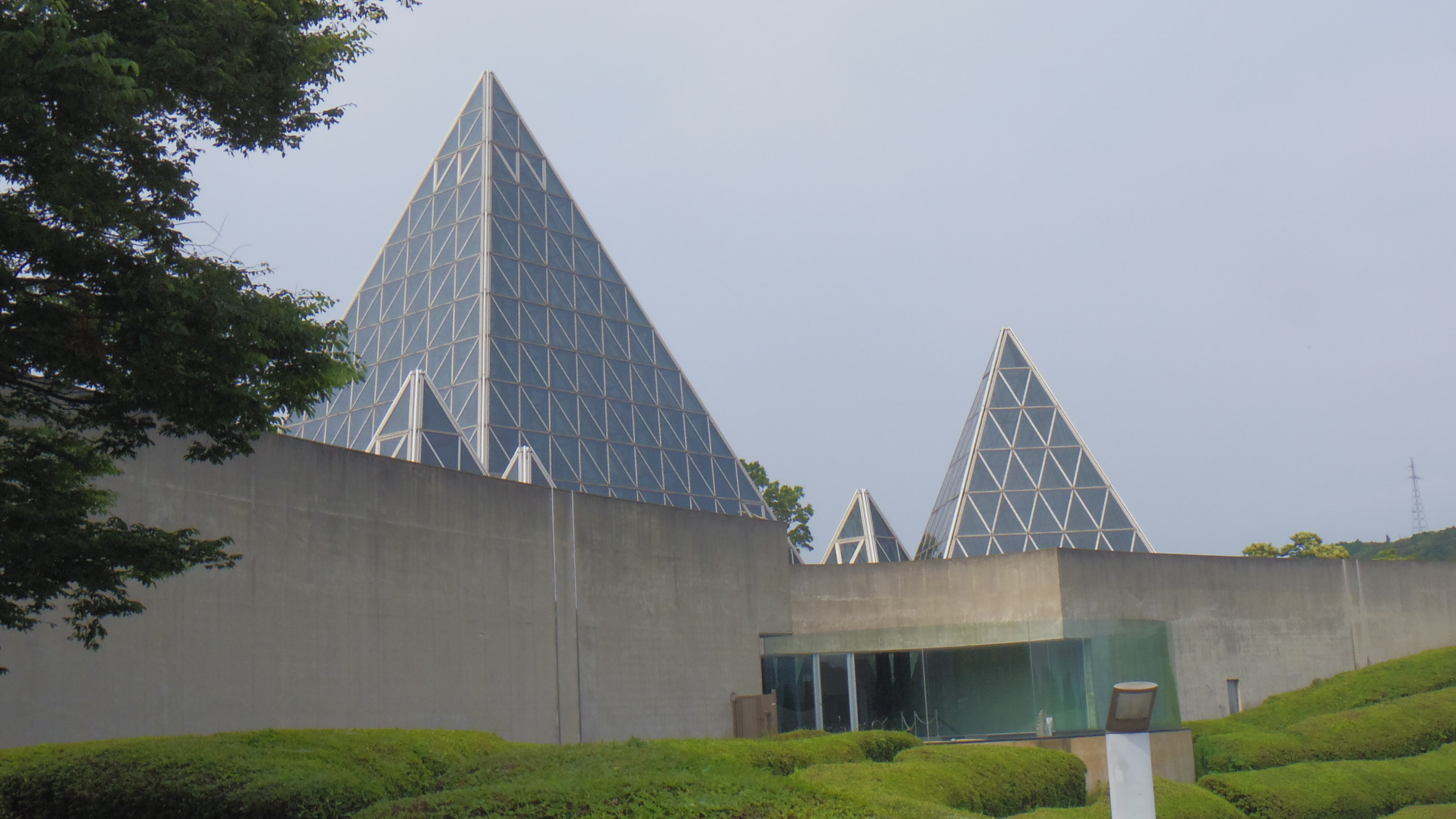 仁摩サンドミュージアム（島根県大田市）外観。2016年6月11日、旅行中に撮影。